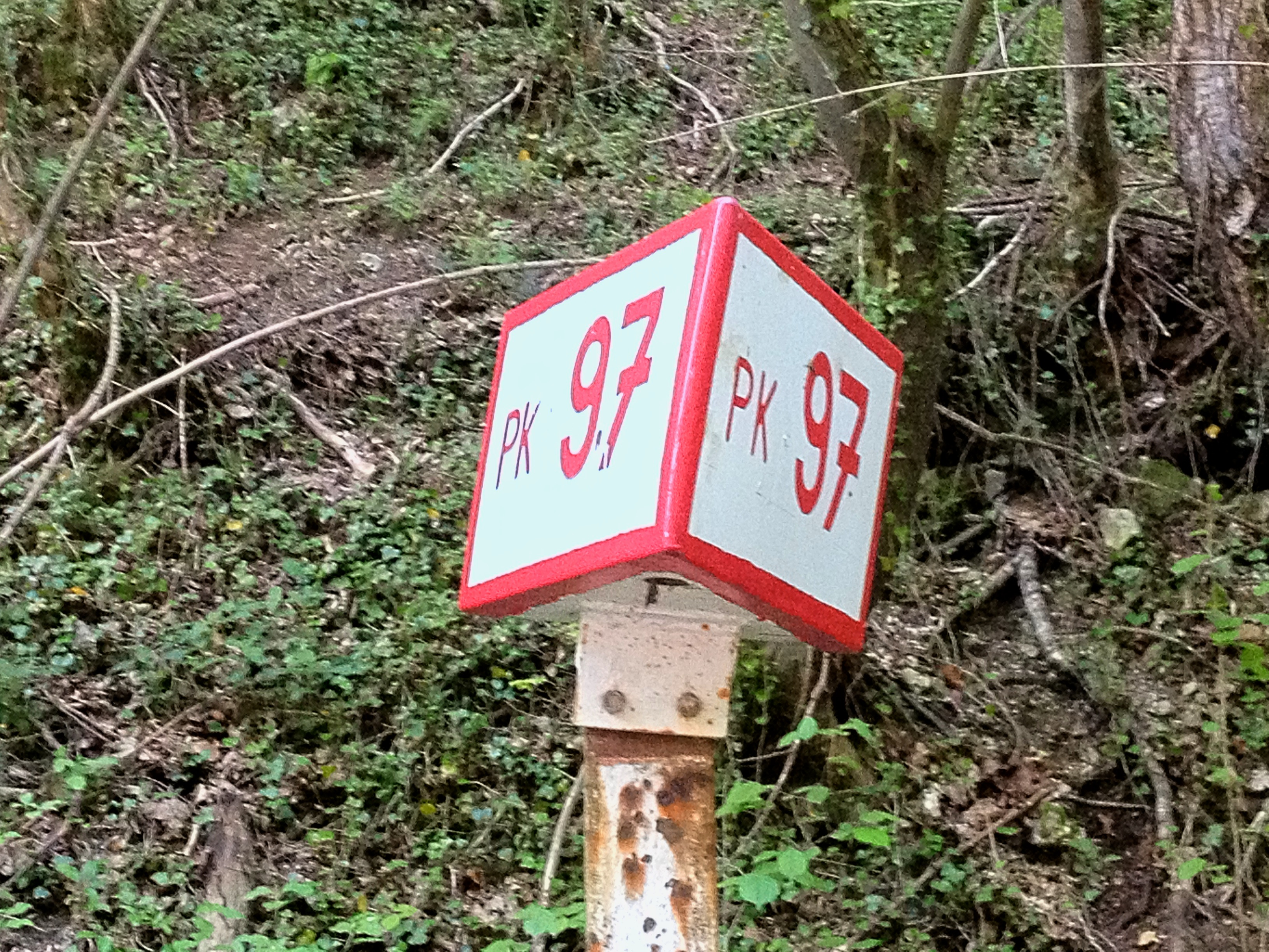 Point kilométrique SNCF n°97 sur la ligne de Rouen à Orléans